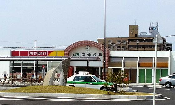 南仙台駅 Minami-Sendai Station. East Japan Railway Co.